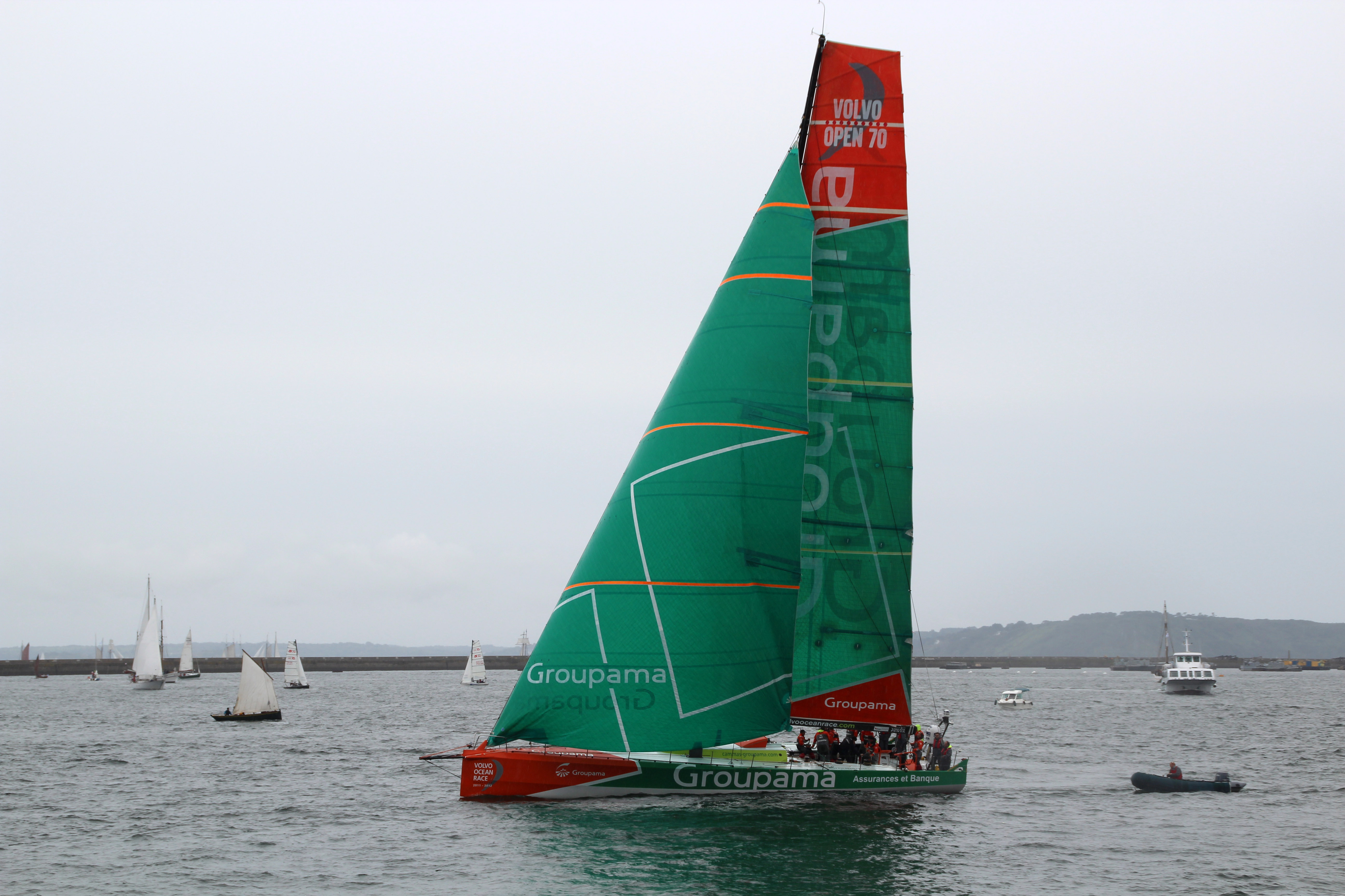 Tonnerres de Brest 2012 Groupama en rade abri